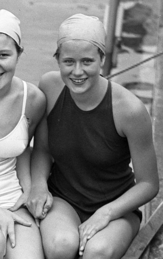 Zwemkampioenschappen te s Gravenhage Tony Hom